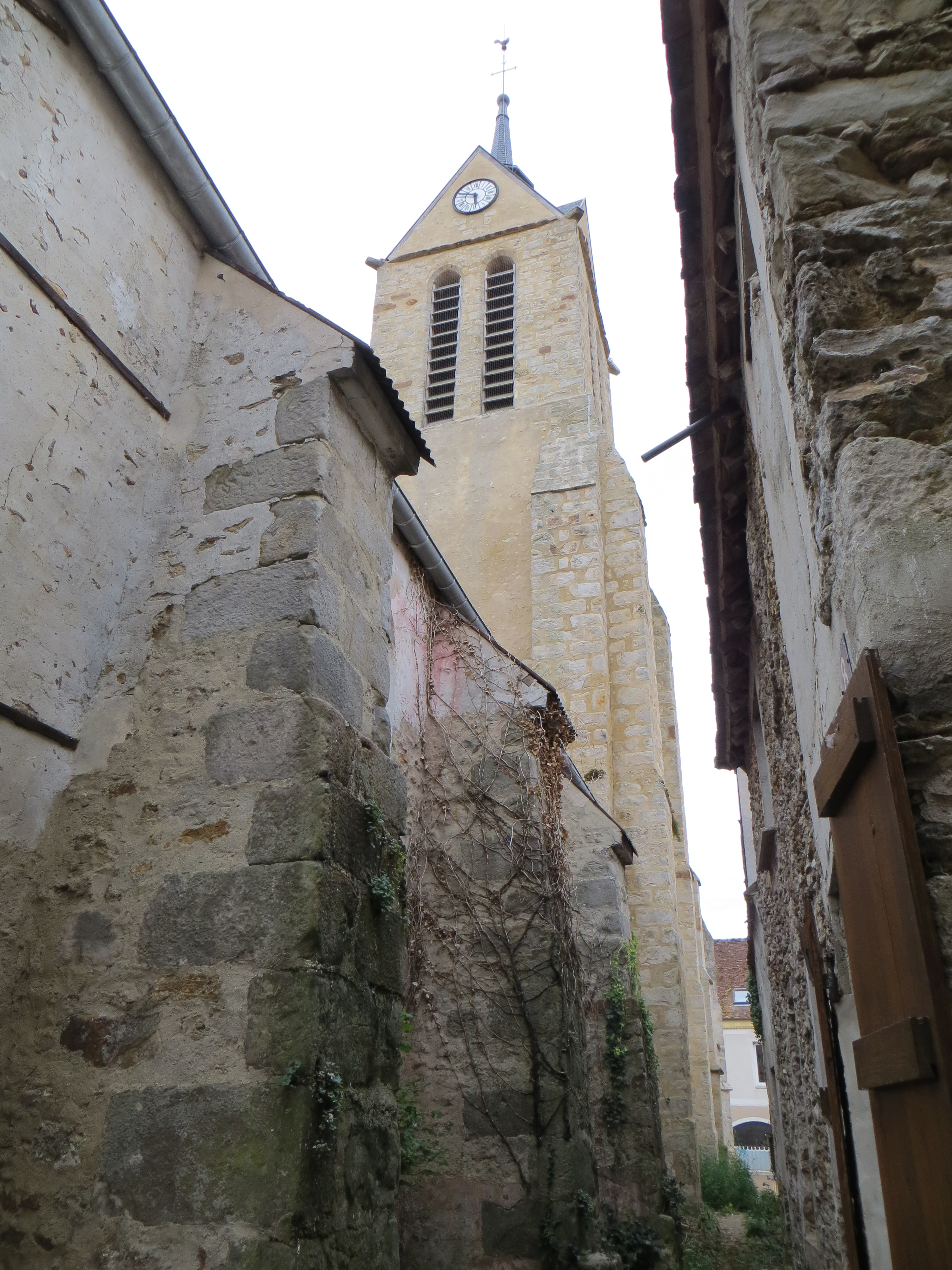 Vues de l'église Saint-Pierre Sainte-Flodoberthe